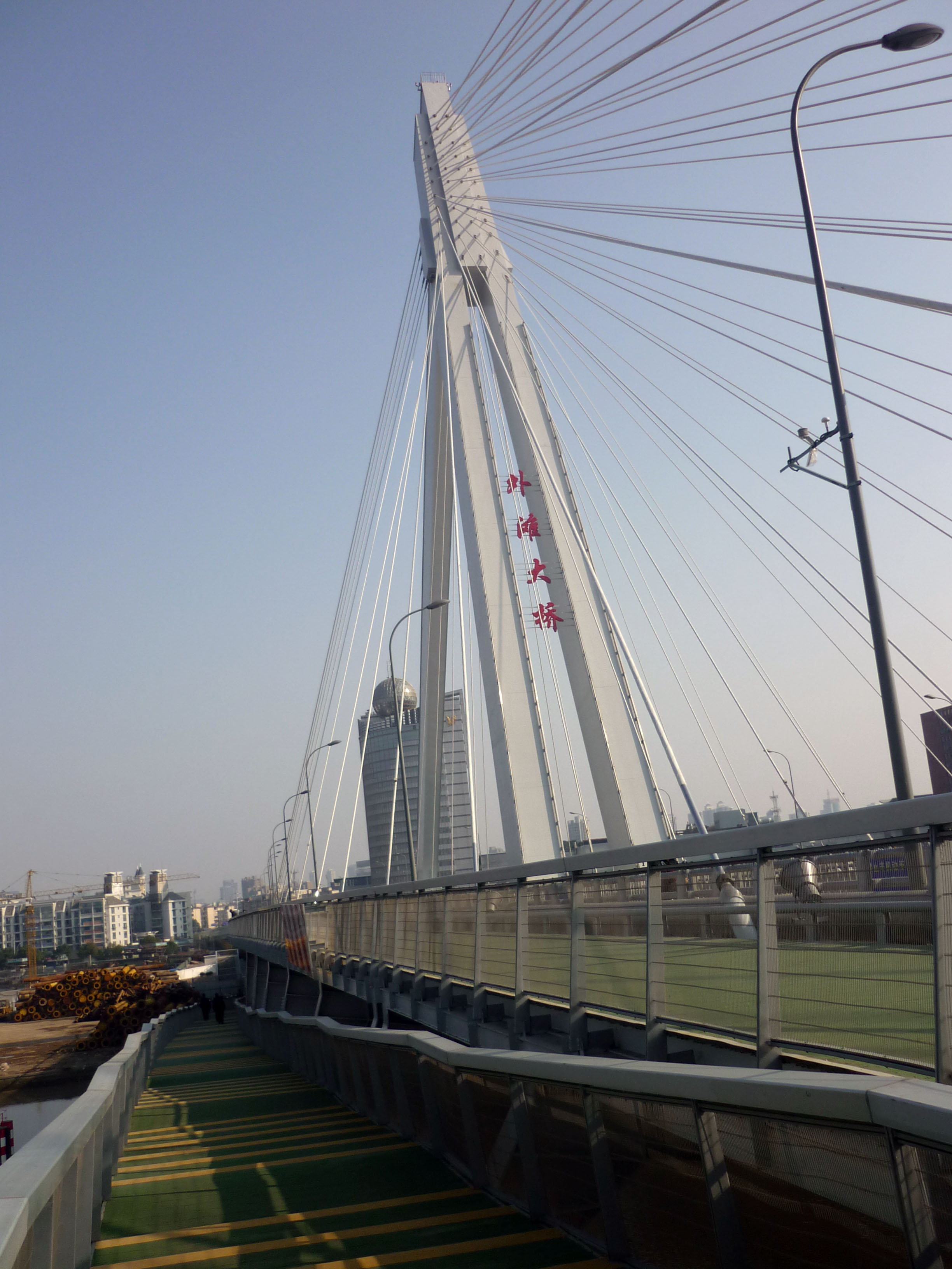 外滩大桥江东侧悬挑人行道